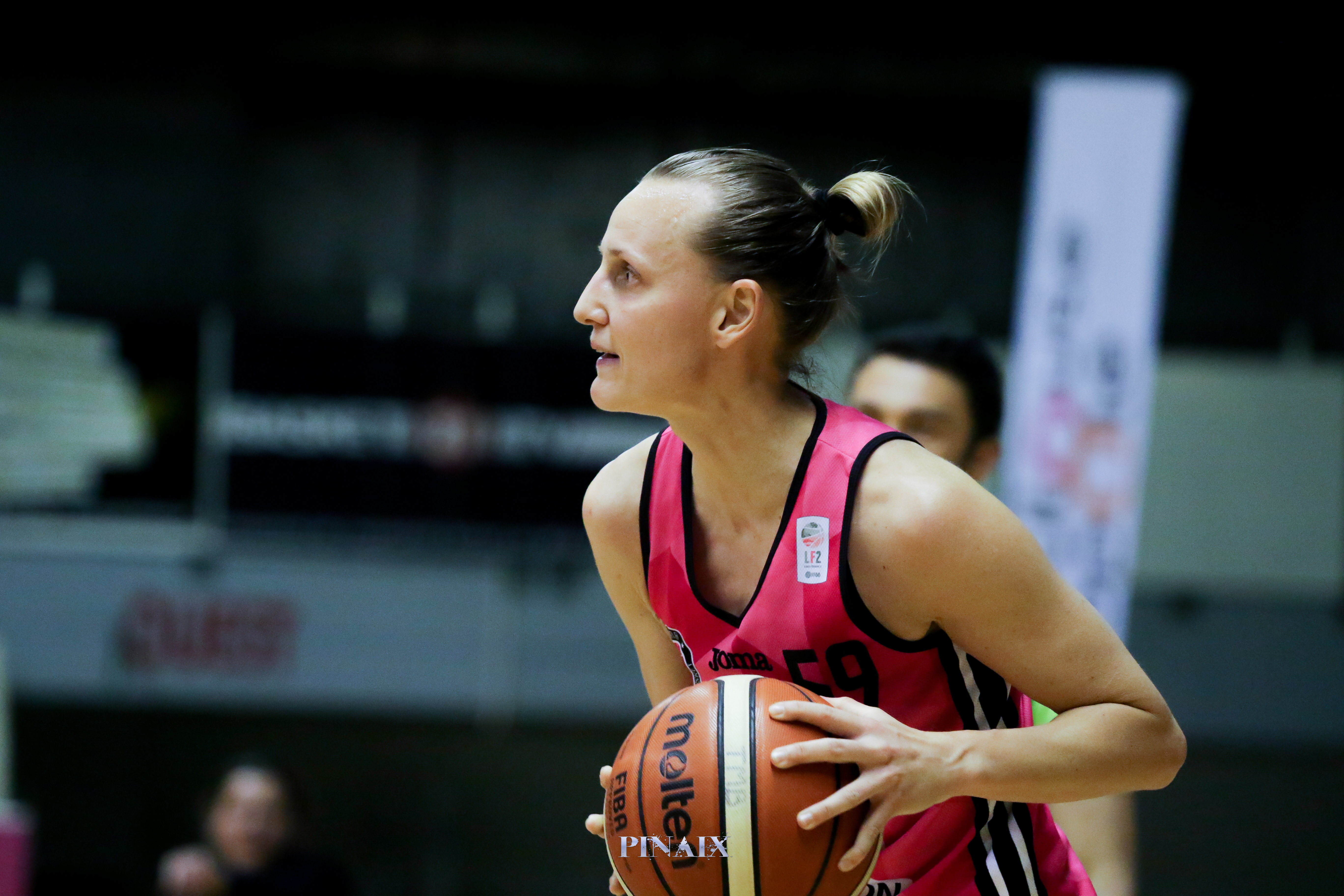 Sylvie Gruszcynski